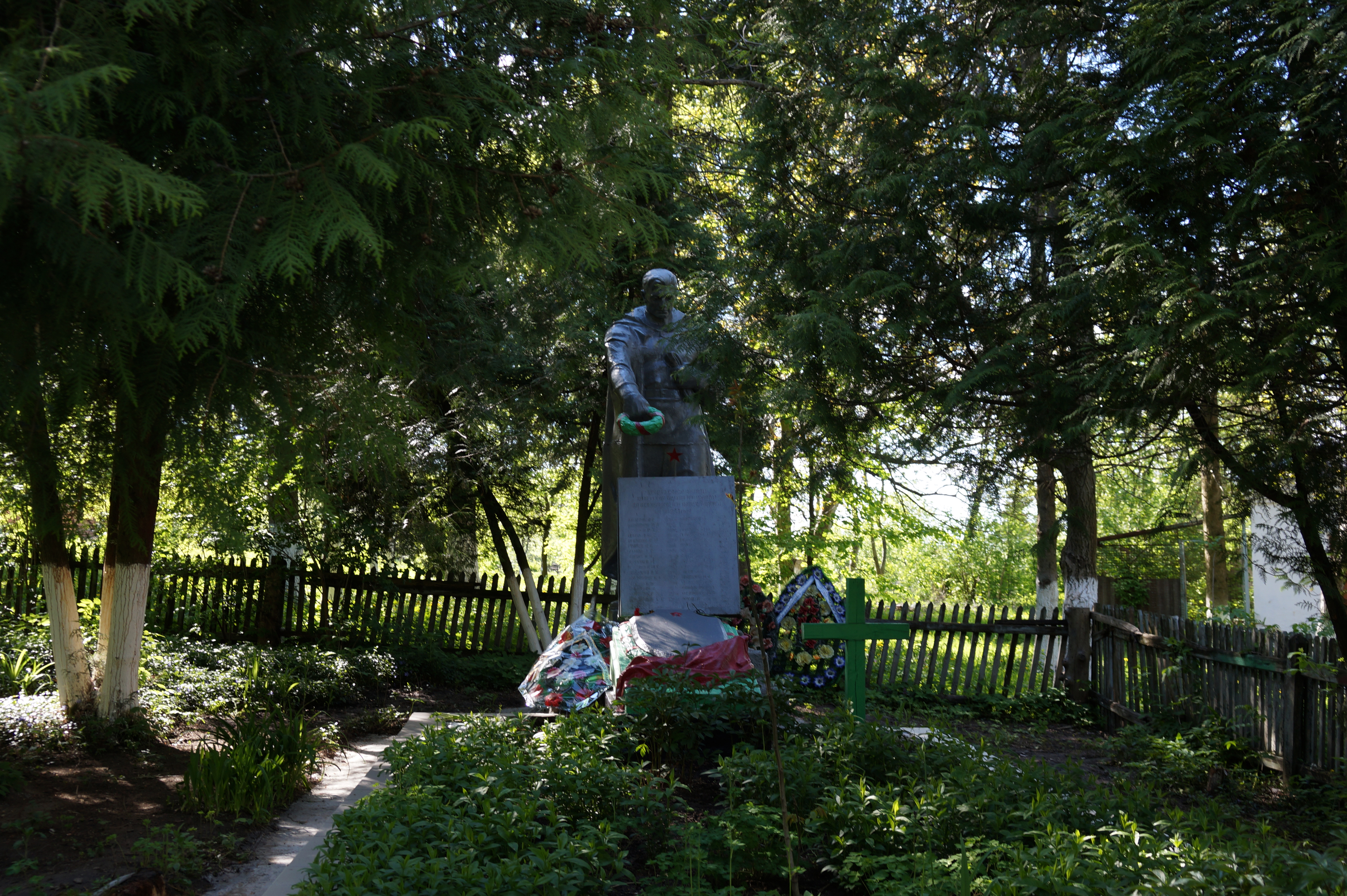 Пам'ятний знак на честь воїнів-односельців, село Редвинці, вул. Комсомольська